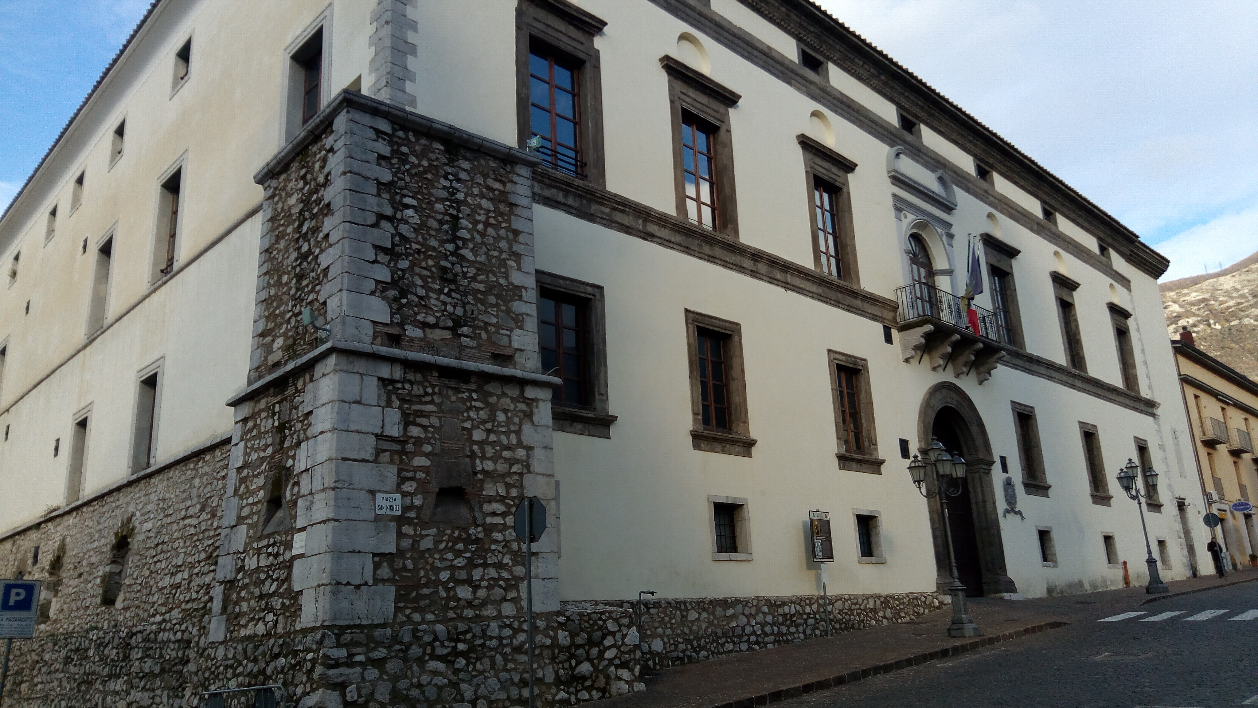 Palazzo Ducale Orsini, oggi sede comunale